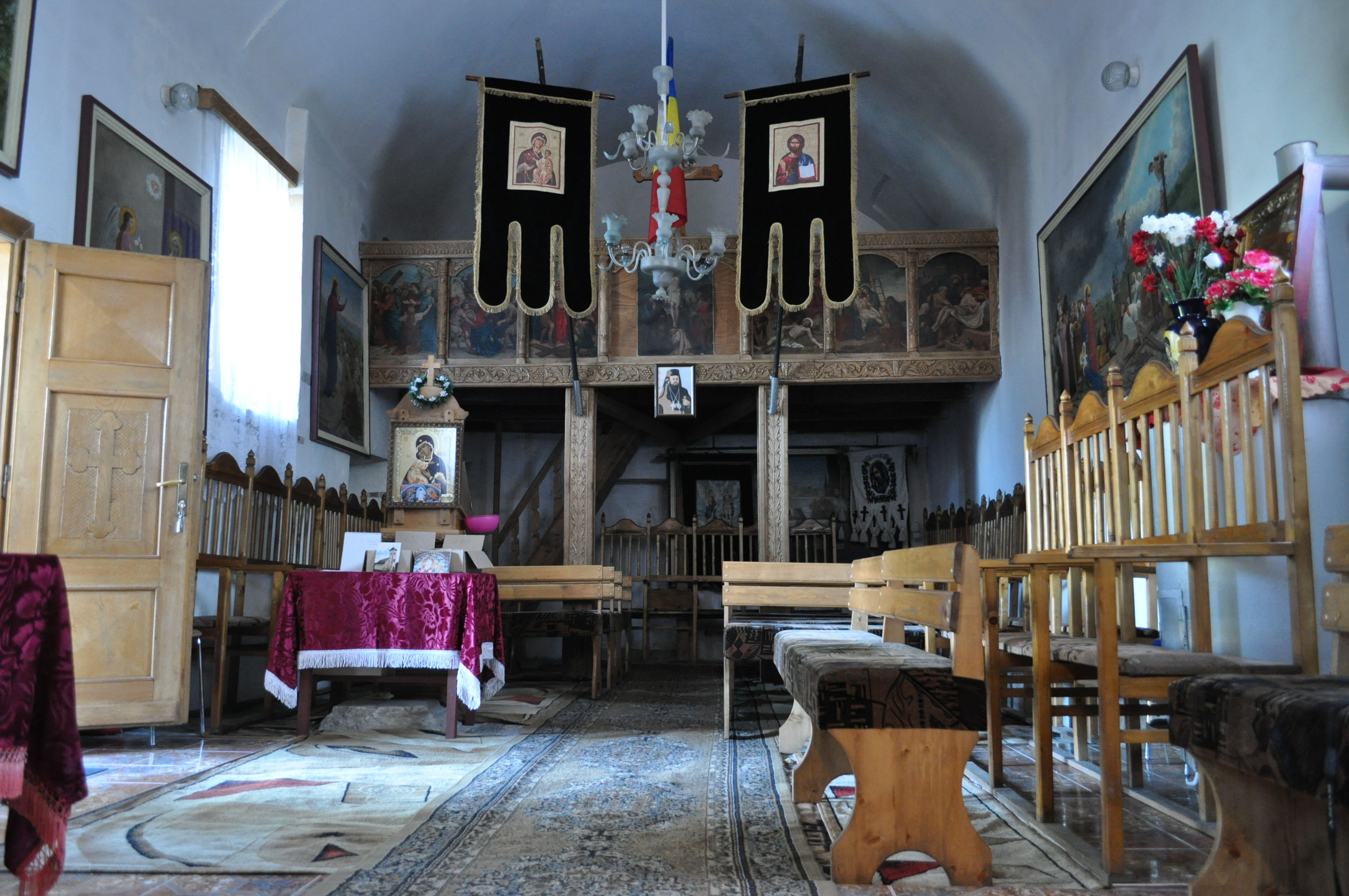 Biserica "Pogorârea Sfântului Duh", sat OSTROV; comuna RÂU DE MORI 01